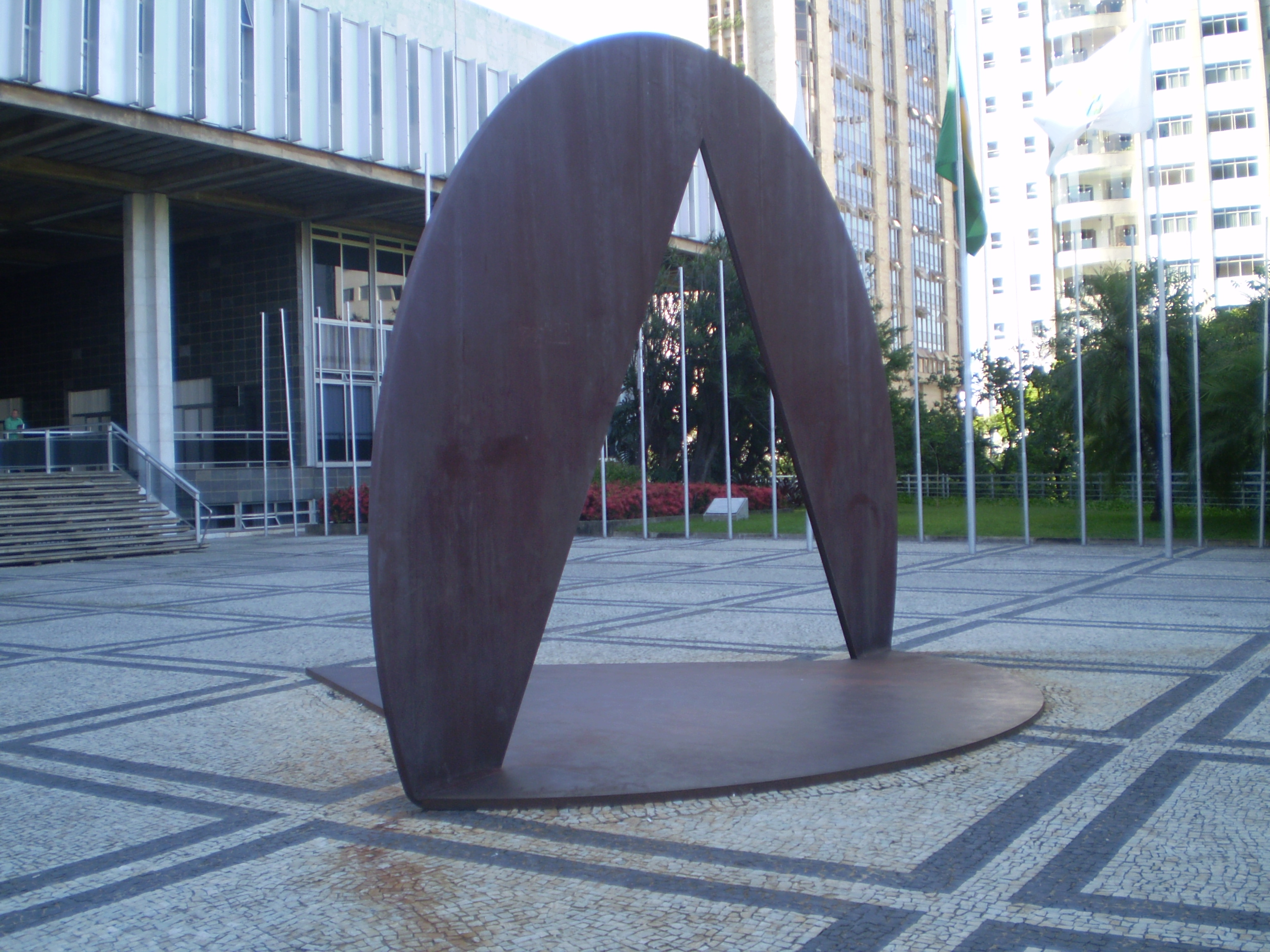 Escultura do artista Amilcar de Castro, instalada no Hall das Bandeiras do Palácio da Inconfidência, em 1988, que marcou a abertura da IV Constituinte Mineira e o bicentenário da Inconfidência. A escultura retrata o sentimento do artista em relação à reabertura política do País. "O triângulo dá passagem à representação popular e aponta o caminho da construção democrática; o círculo simboliza a aliança sociedade-poder legislativo, fonte e síntese da vontade geral", lê-se na placa que acompanha a obra. A obra de aço, que ocupa uma área aproximada de 30 m², foi totalmente produzida e executada pela Usiminas e é uma das mais conhecidas e importantes obras públicas de Amilcar de Castro, tendo se tornado símbolo da luta popular. O monumento tem a forma circular, com 6 metros de diâmetro, e chapas de 5 cm de espessura e é resistente à corrosão atmosférica.